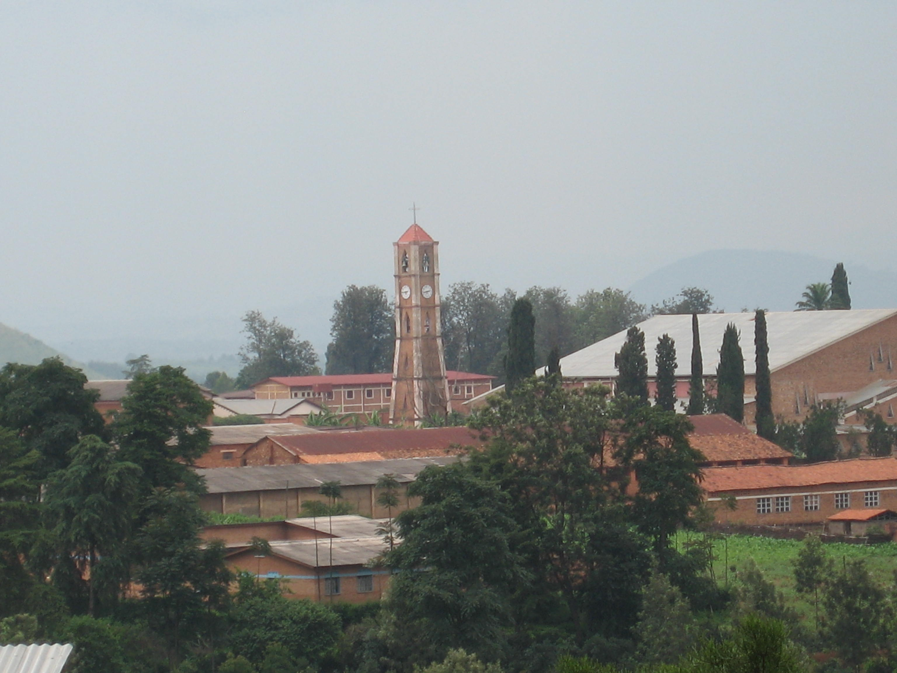 Kiswahili: Kuri iyo sanamu mubona,hariko igisengero c'Ishengero ya Diyoseze ya Gitega MUshasha yitirwe Kristu Mwami. Hariko umunara muremure cane wa diyoseze. Hamwe ni shure rikuru rya Gitega(LYCEE`GITEGA canke benshi bita RUBAMBA..